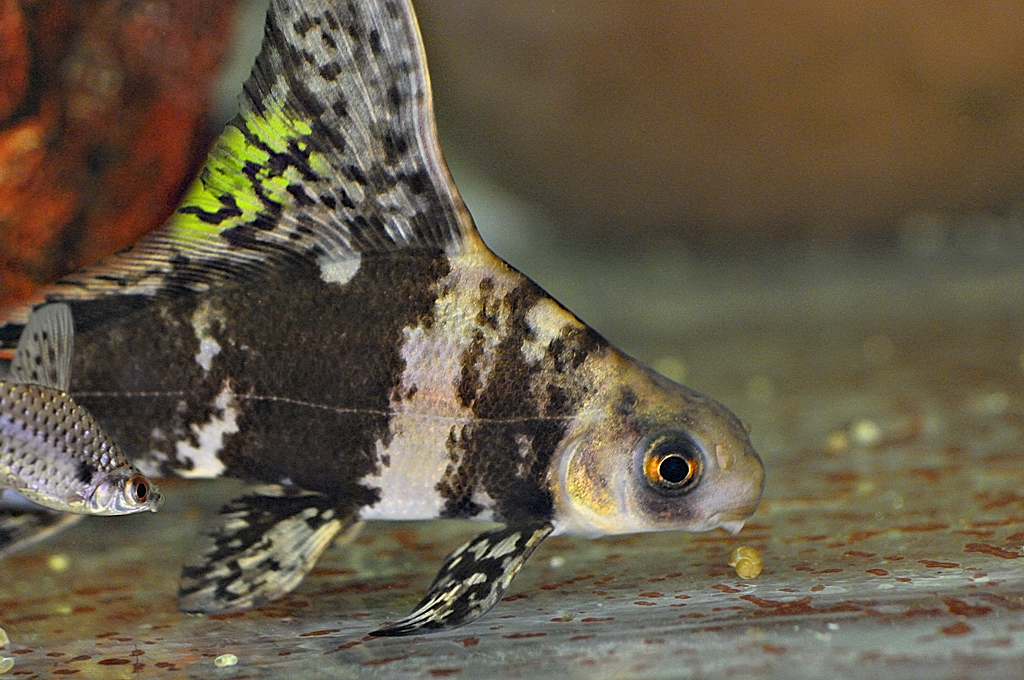 Wimpelkarpfen oder auch Fledermausfisch - begutachtet eine Schnecke.